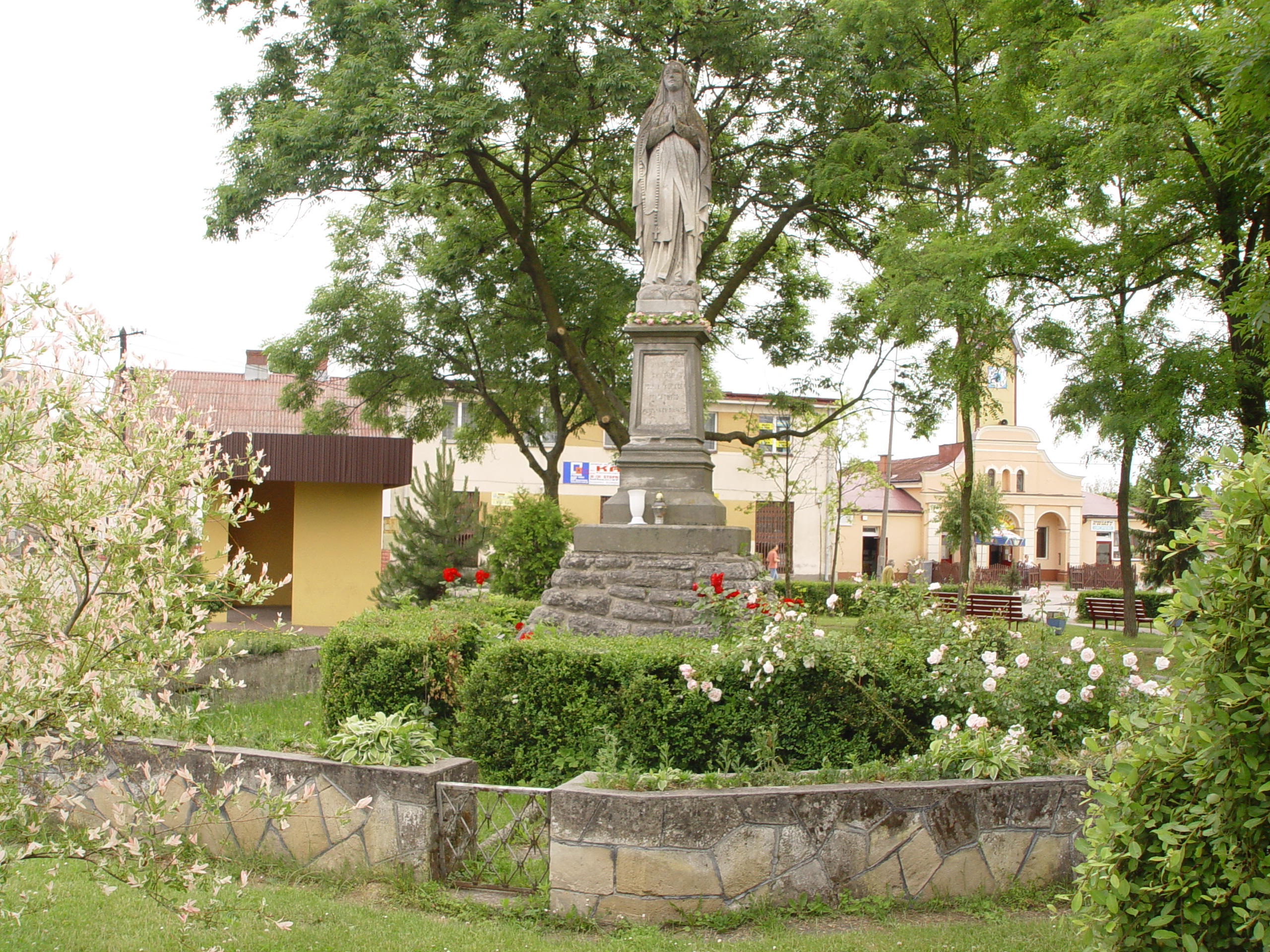 Figura z 1911 r. w parku na oleśnickim rynku.